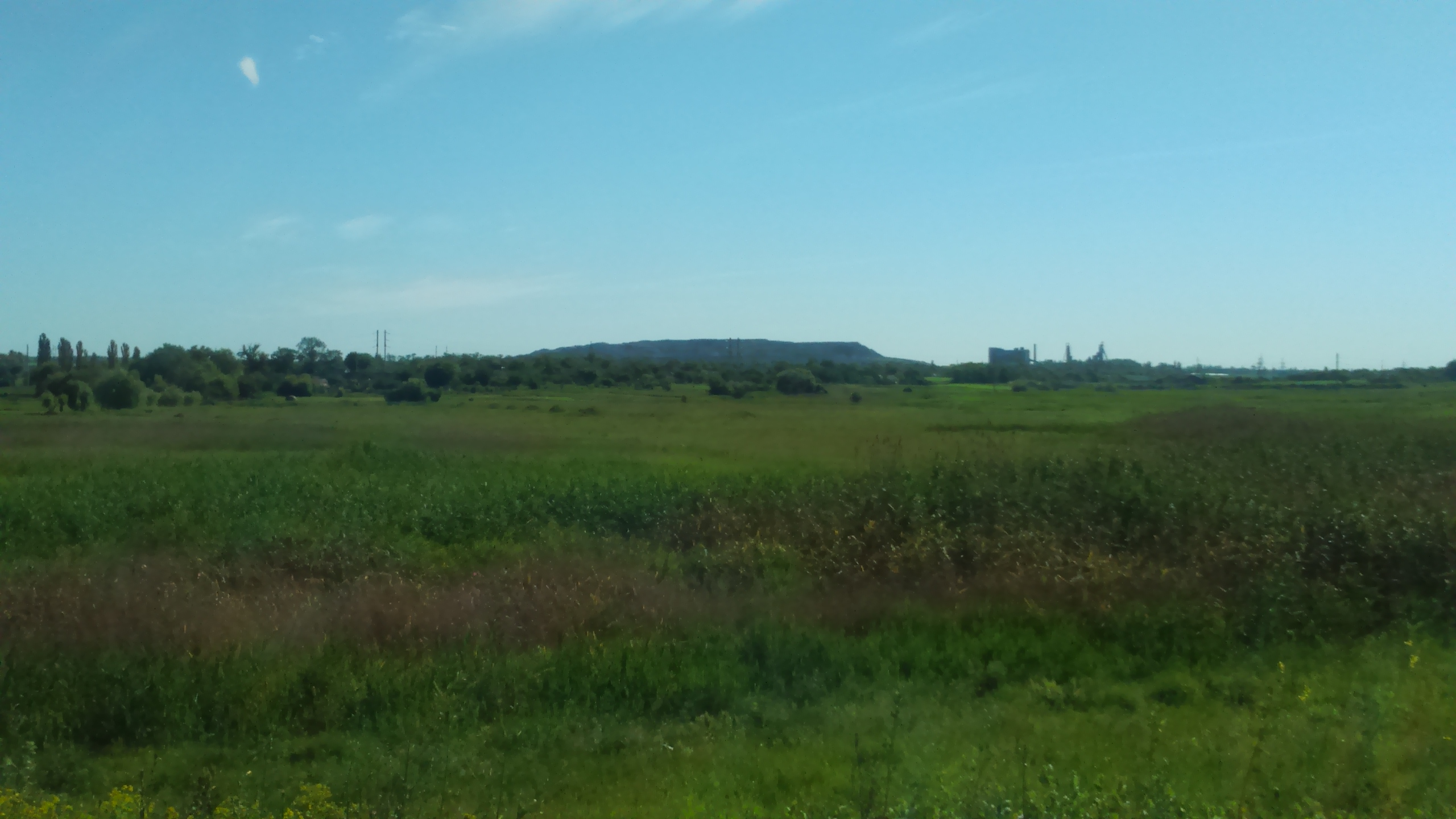 Красноярське — селище в Україні, Добропільському районі Донецької області.